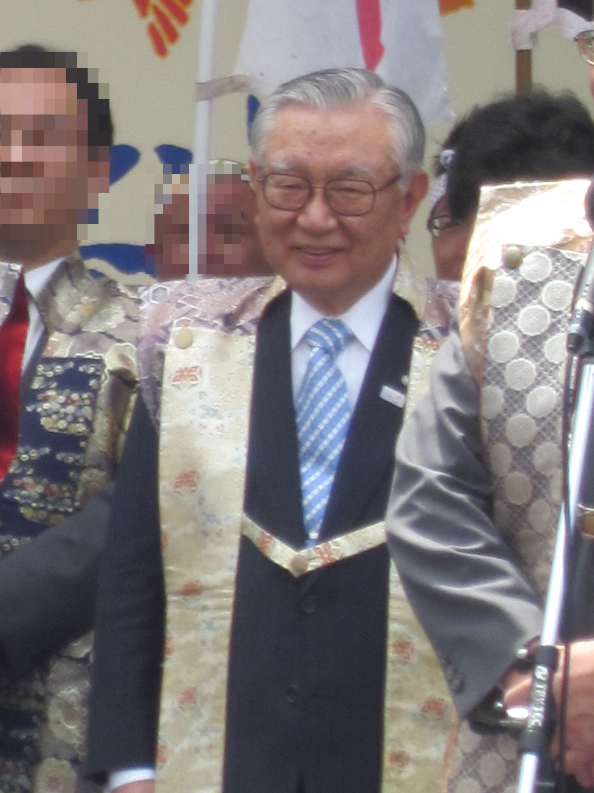 東北電力会長・高橋宏明。2015年5月16日、仙台・青葉まつり開祭式にて。